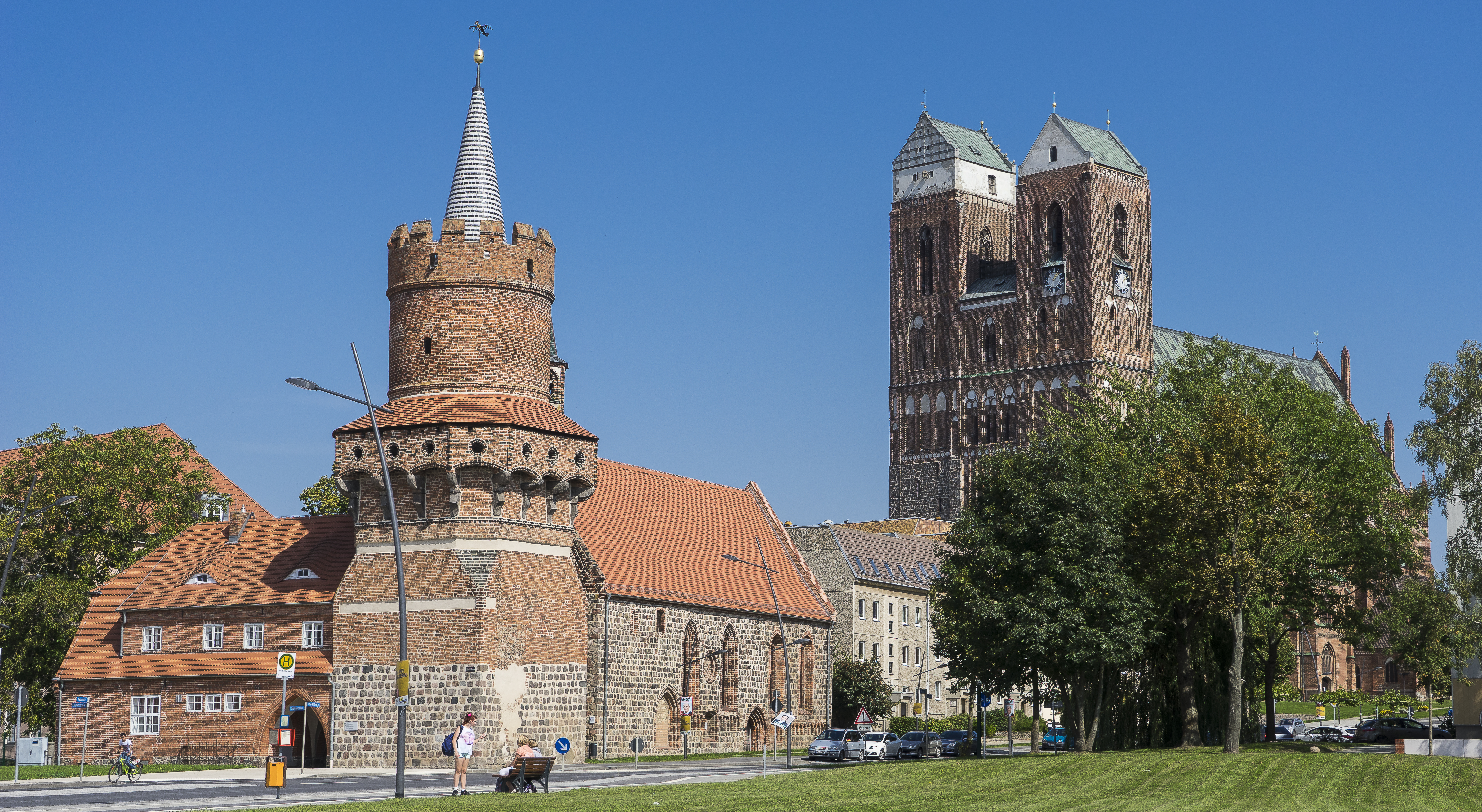 Mitteltorturm, Ruine der Heiliggeistkirche und St.-Marien-Kirche in Prenzlau